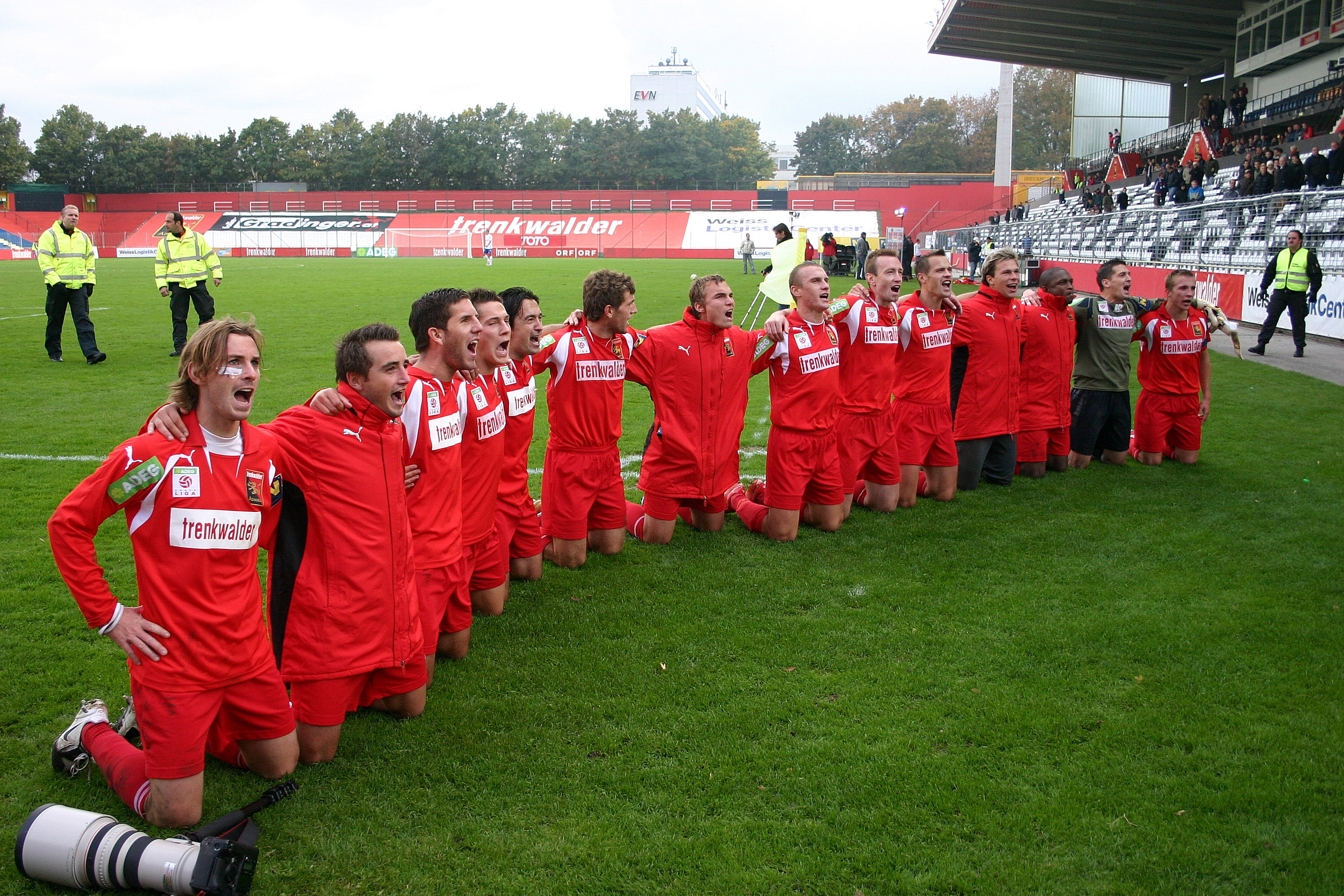 Die Mannschaft des FC Trenkwalder Admira Wacker bejubelt den Sieg gegen den FC Magna Wiener Neustadt